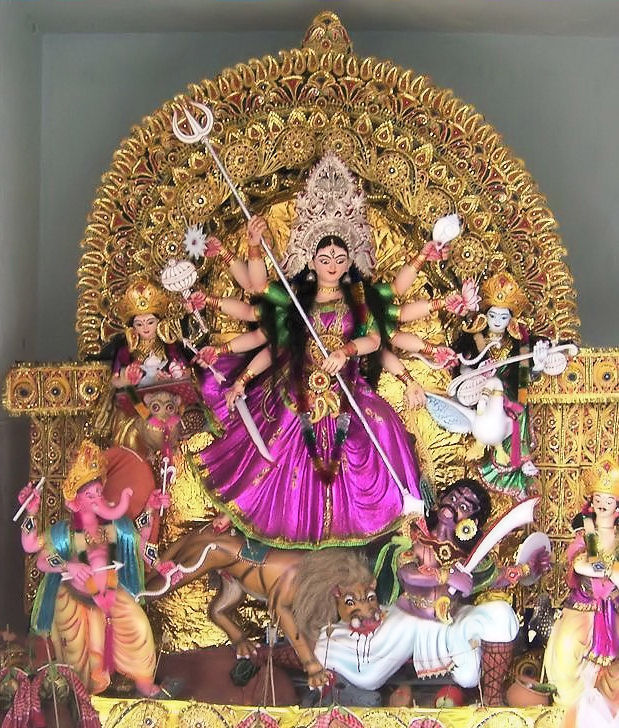 Godess Durga during Dussserah Festival in BBSR